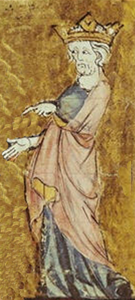 Ludvík VI. Francouzský